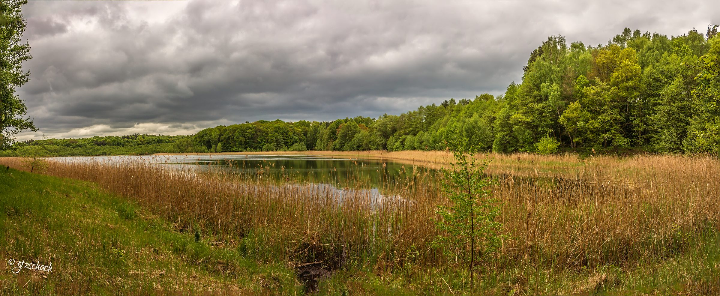 Redernswalder See